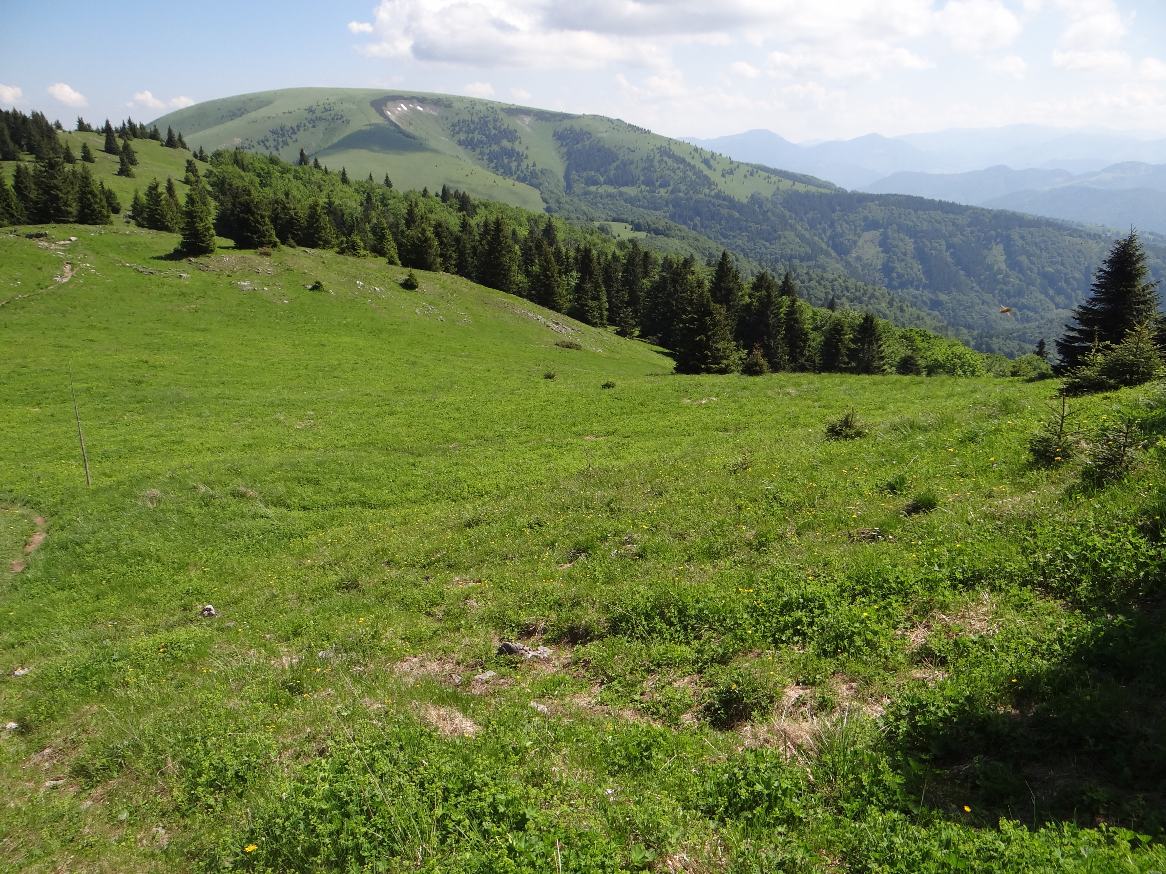 Ploská. View from Koniarky